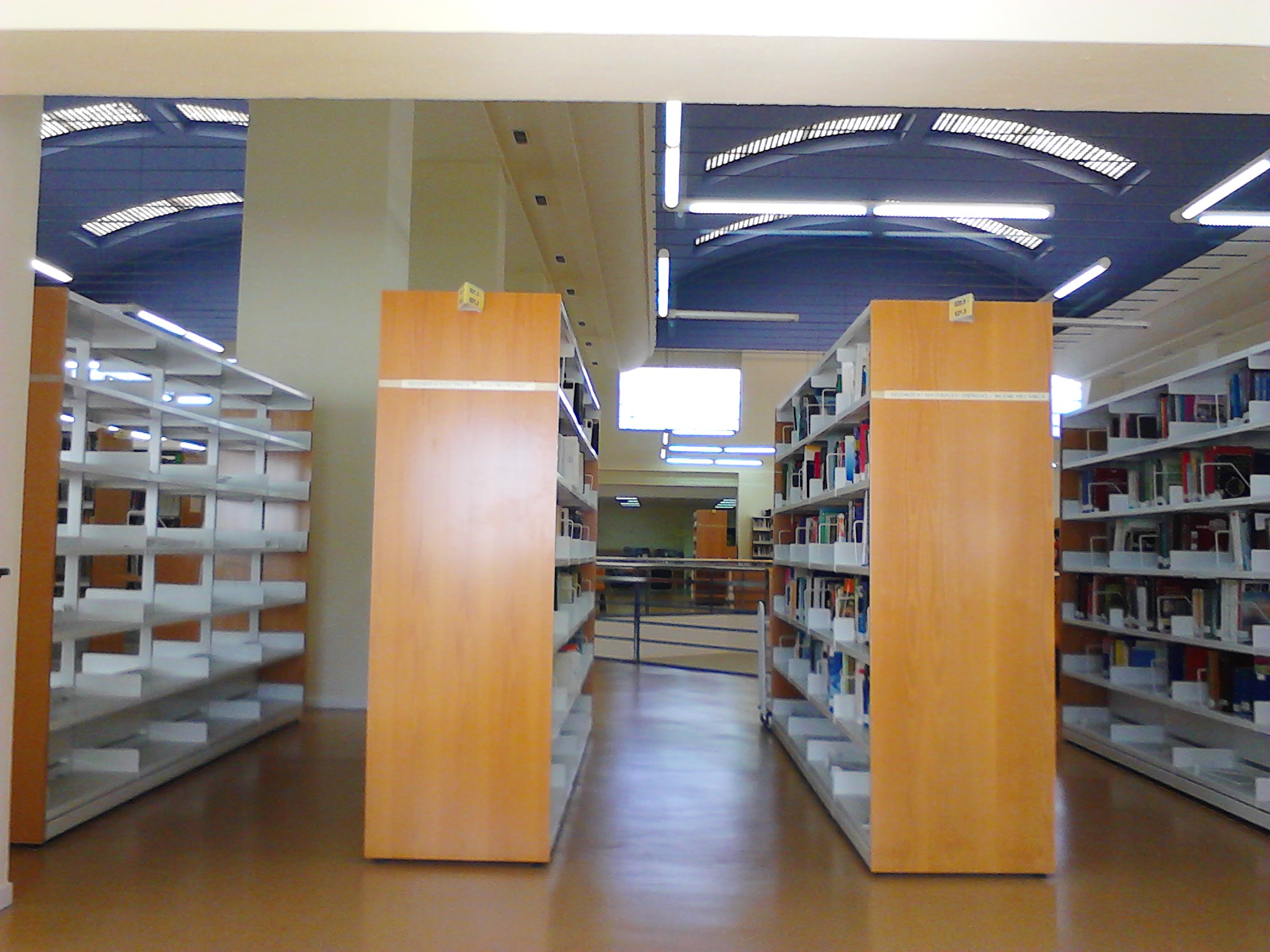 Biblioteca Maimónides del Campus de Rabanales de la Universidad de Córdoba (España).